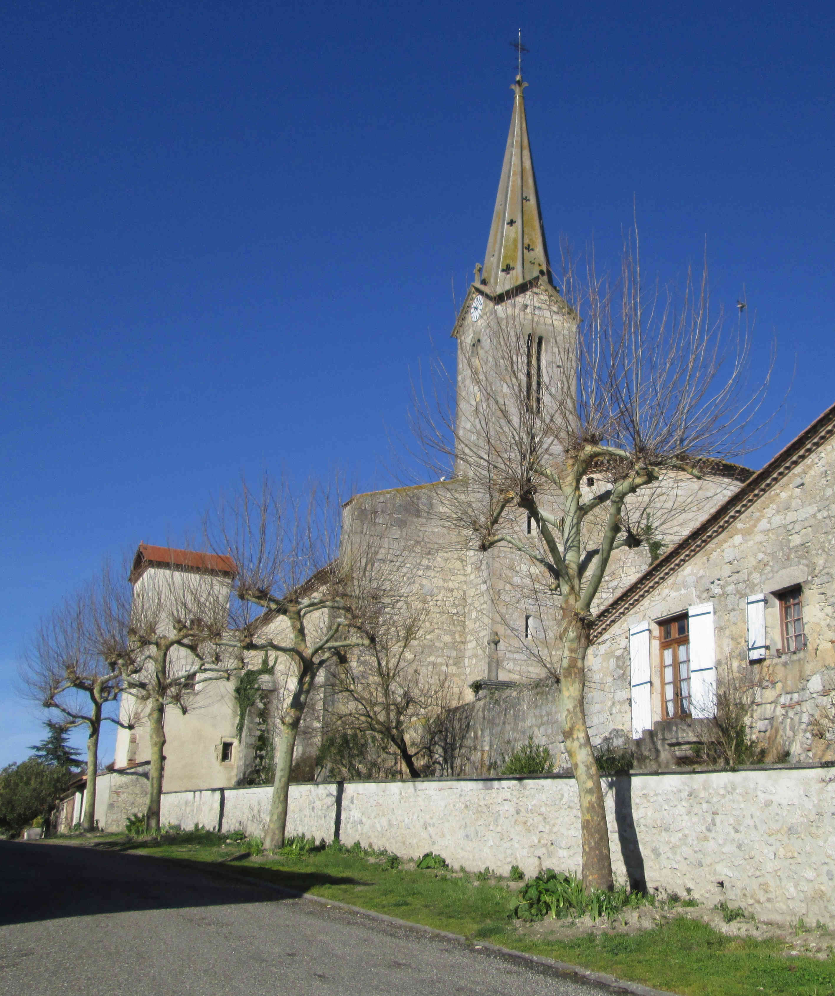 Galapian : l'église Saint-Christophe, vue du sud-est